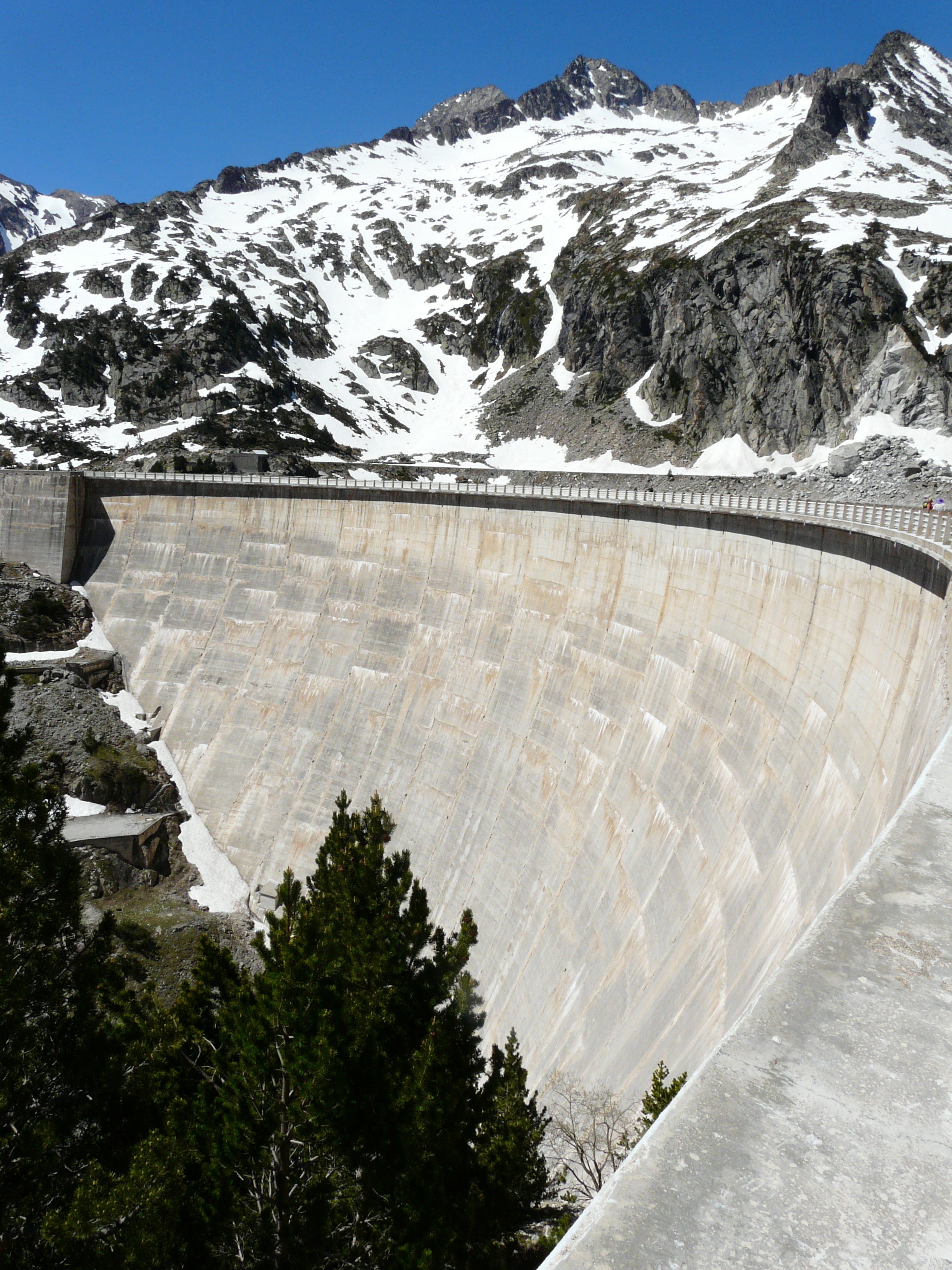 La partie externe du barrage de Cap-de-Long vue depuis le nord, Aragnouet, Hautes-Pyrénées, France.